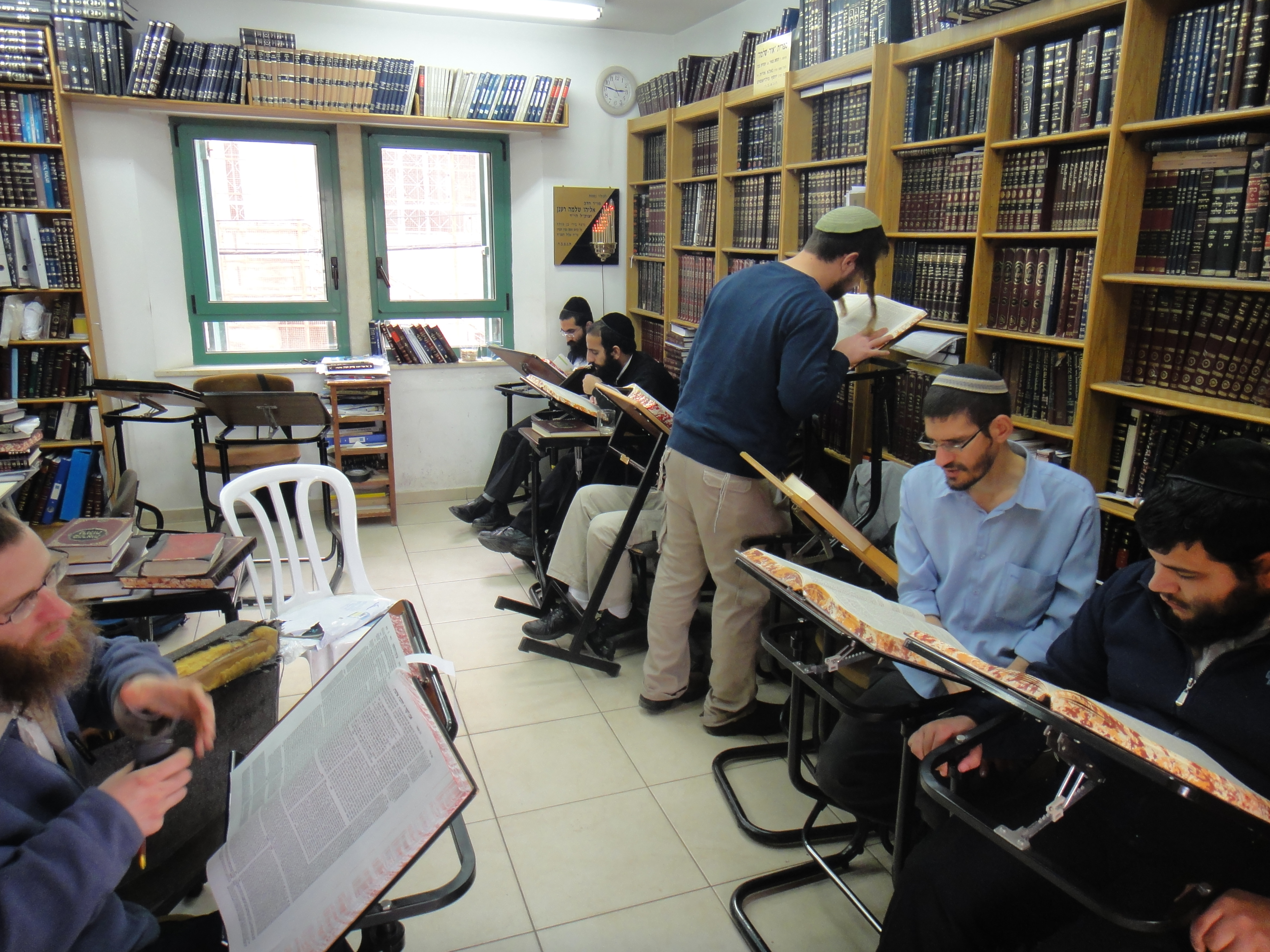 תמונות של היישוב היהודי בחברון. הכולל במצפה חברון.